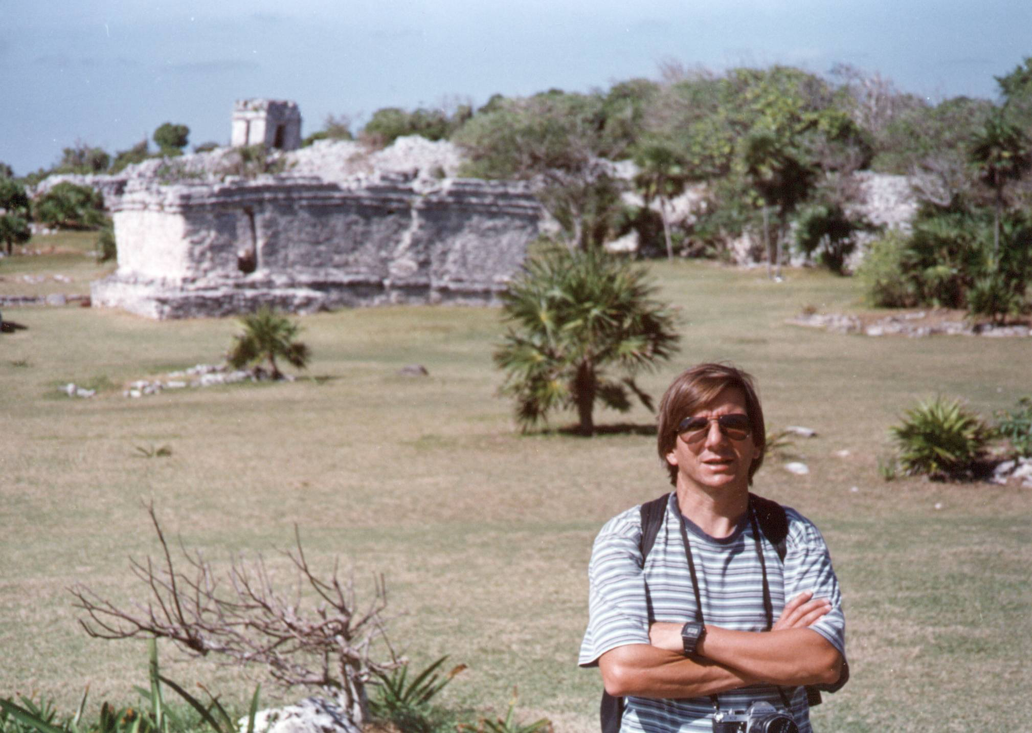 El ornitólogo M. Martinez